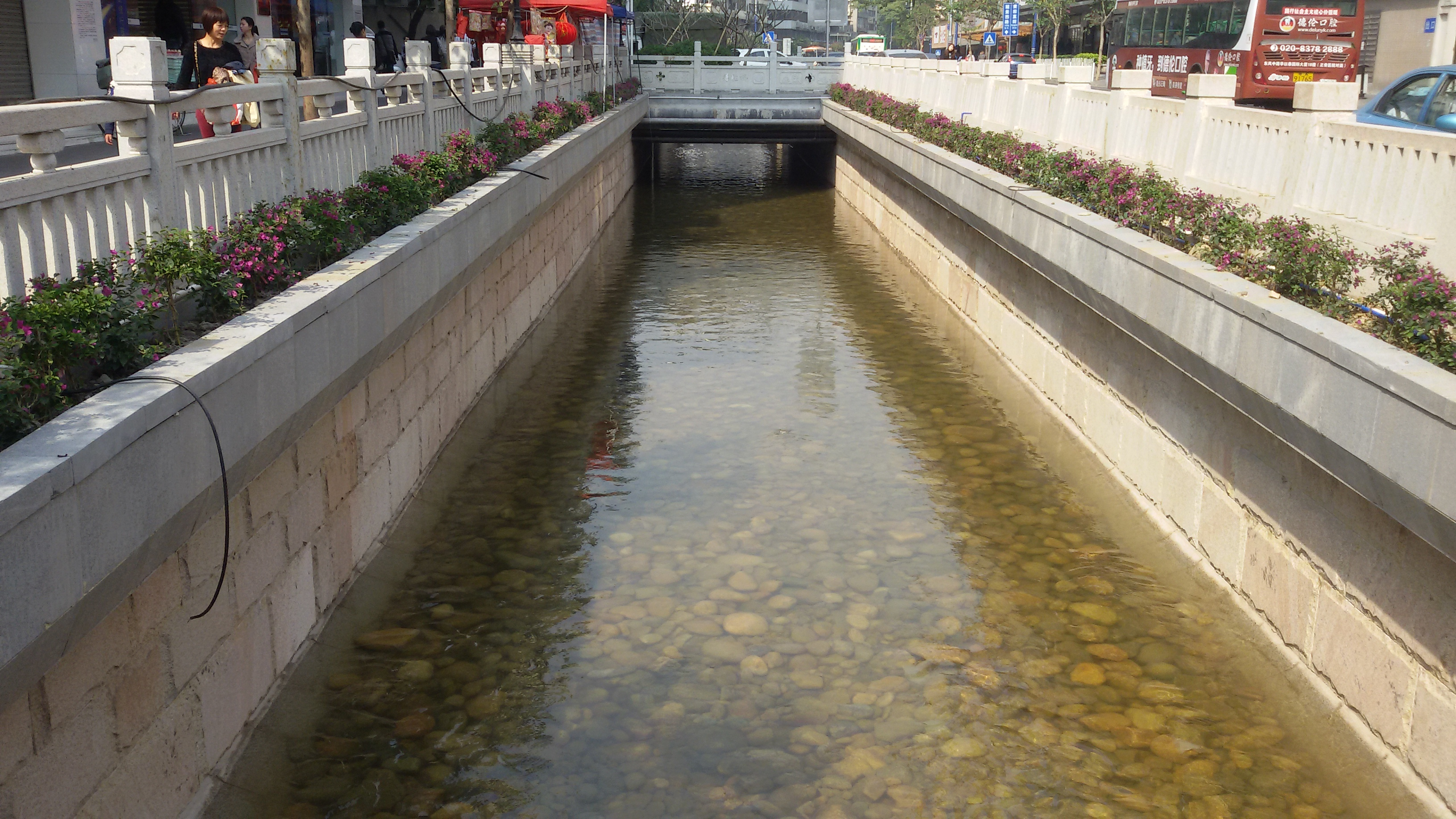 粵語: 东濠涌二期嘅河流一处（麓景路入面）